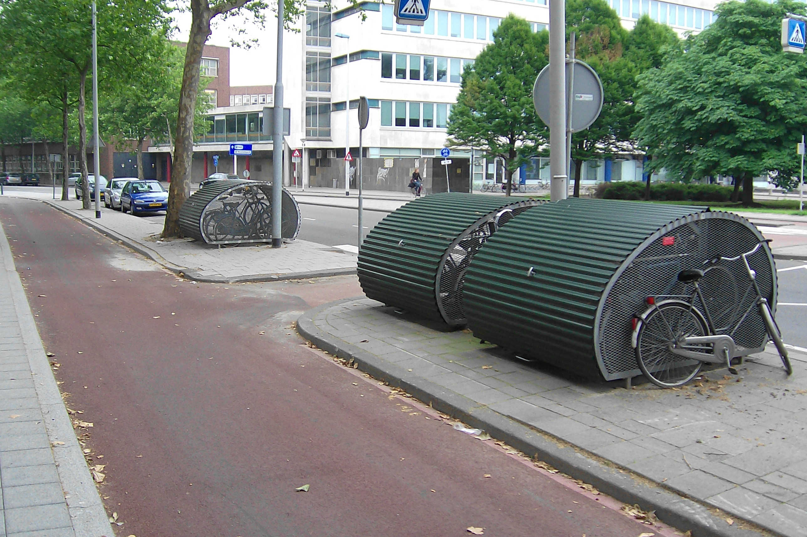 Mobilitätsfördernde Fahrradgaragen (innerstädtisch/quartiersadäquat) in Rotterdam, Niederlande